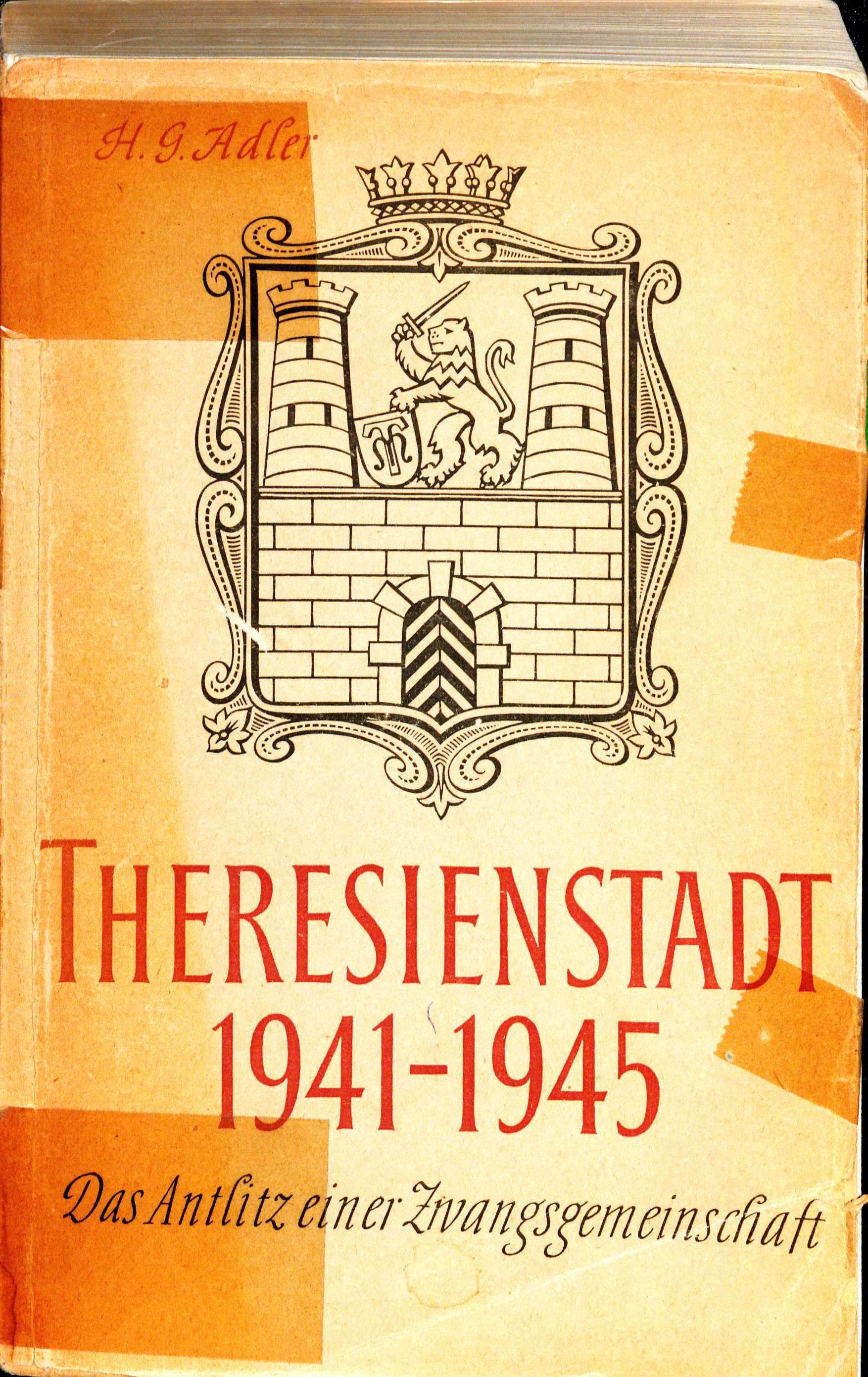 H. G. Adler Theresienstadt 1955 Einband Das Stadtwappen von Theresienstadt in einer Abwandlung, wie sie in Berichten der jüdischen Lagerverwaltung an die SS-Kommandantur verwendet wurde (Adler, S. IV)